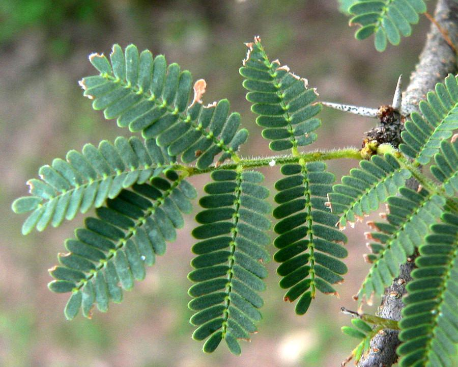 Acacia tortuosa, Guadeloupe avril 2006